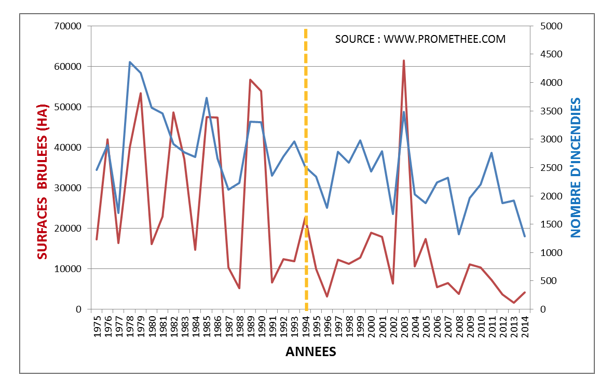 Evolution surfaces forestières brûlées et nombre d'incendies dans le sud-est France de 1975 à 2014